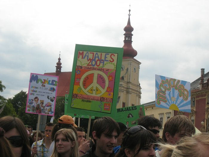 Česky: Gymnázium Ladislava Jaroše Holešov - Majáles 2009